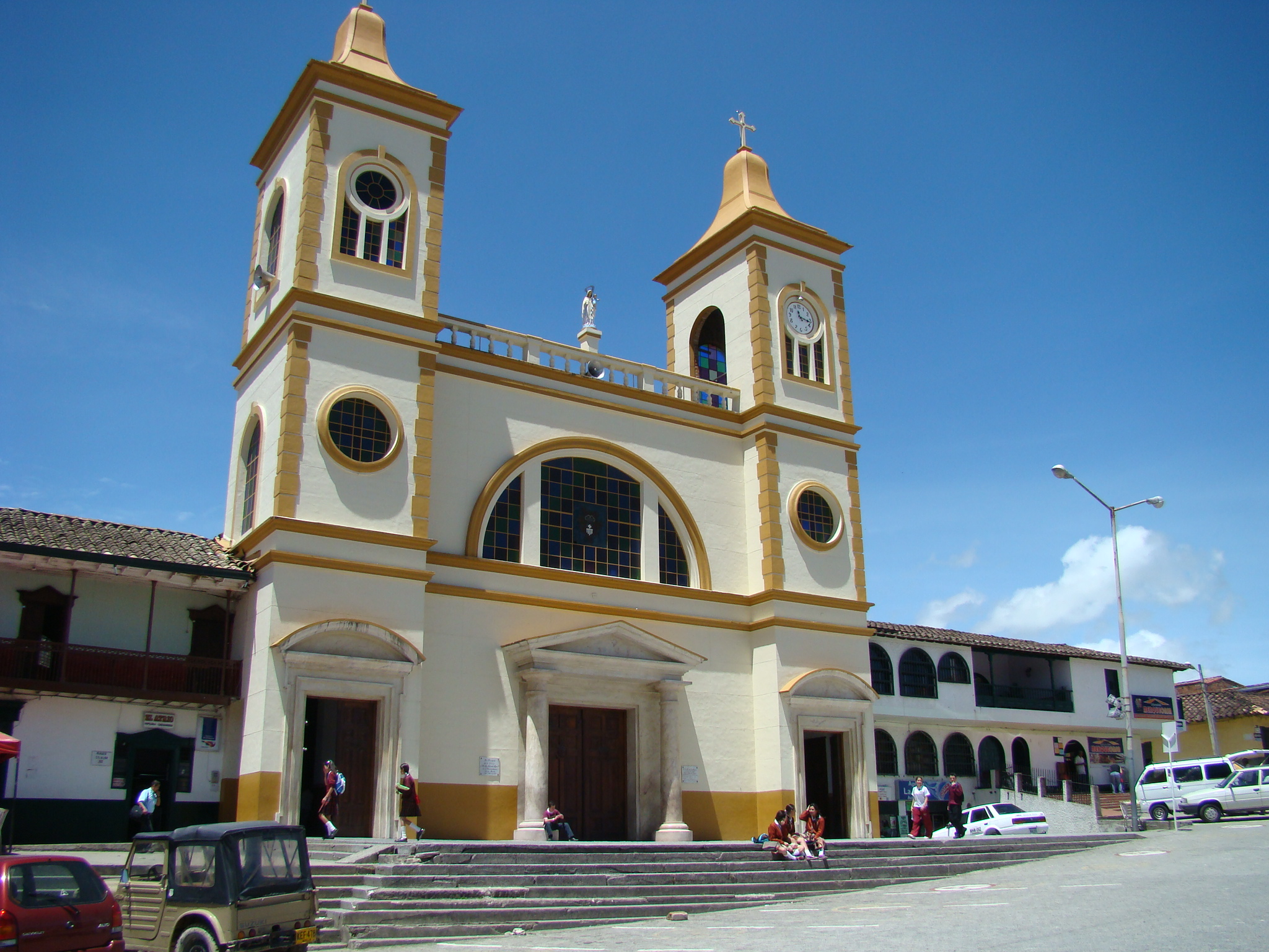 Iglesia de La Unión, Antioquia.